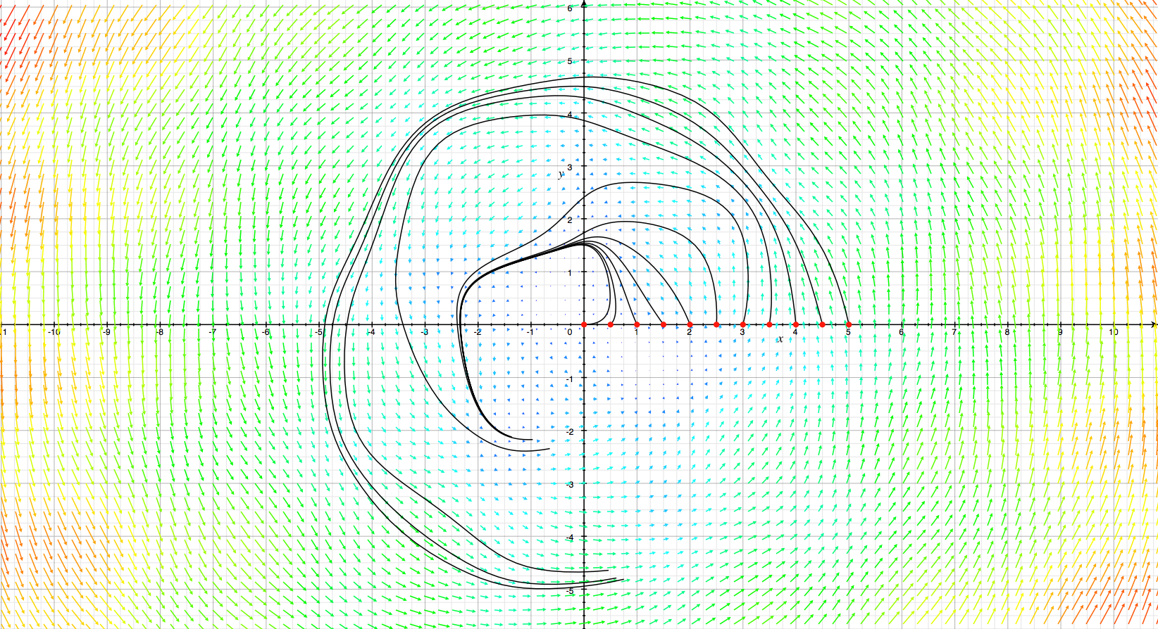 Soluzione di un'equazione differenziale